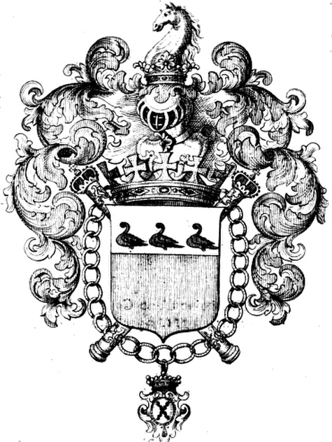 Wapenherault van Vlaanderen: Louis d'Ursel